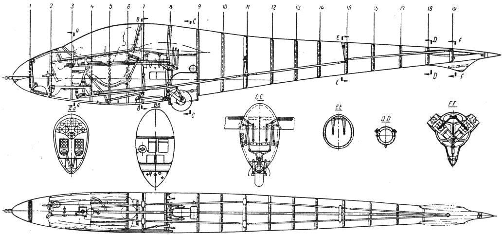 SemiMonocoque fuselage